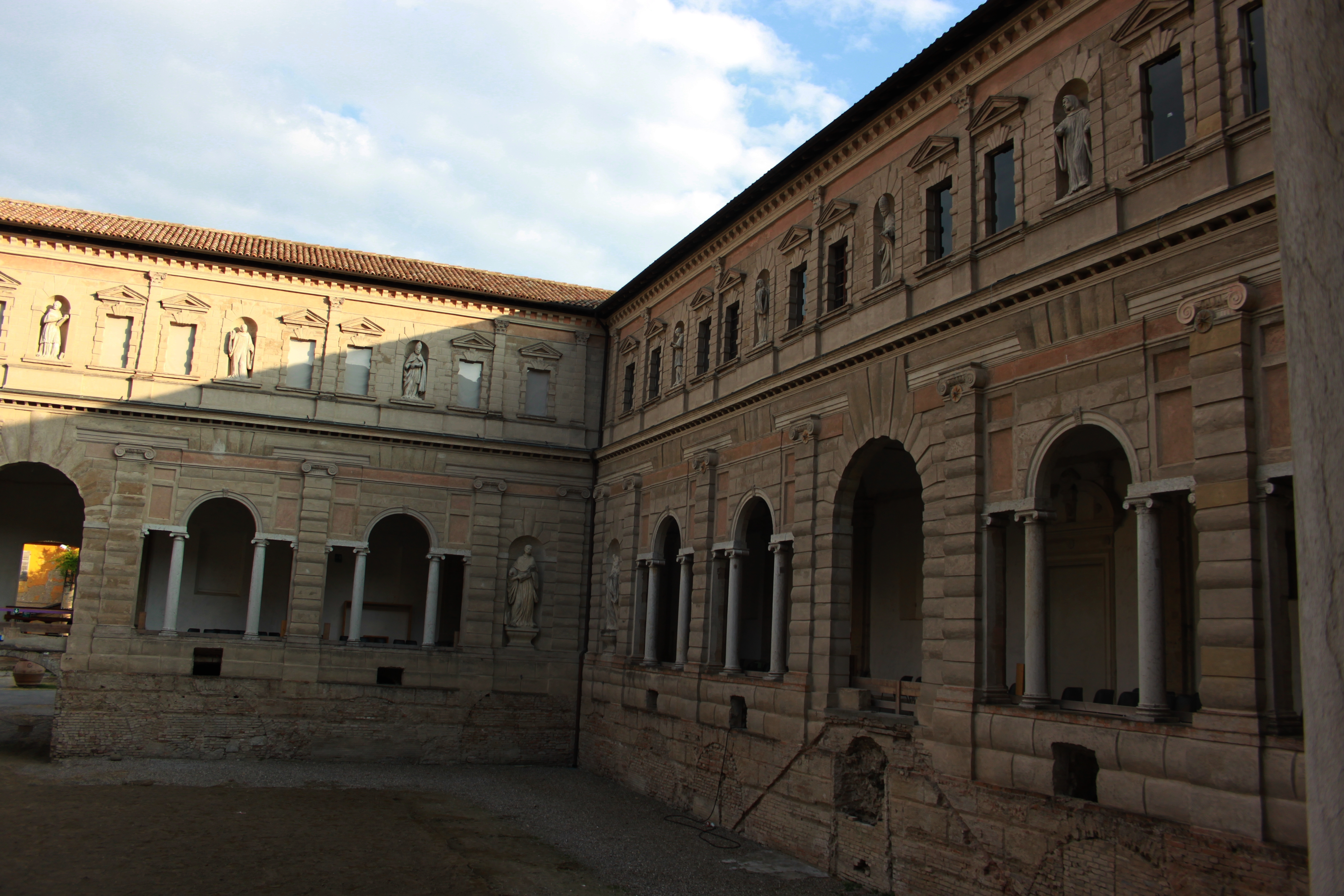 Chiostri di San Pietro This is a photo of a monument which is part of cultural heritage of Italy.